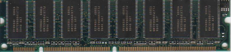 Mémoire RAM SDRAM